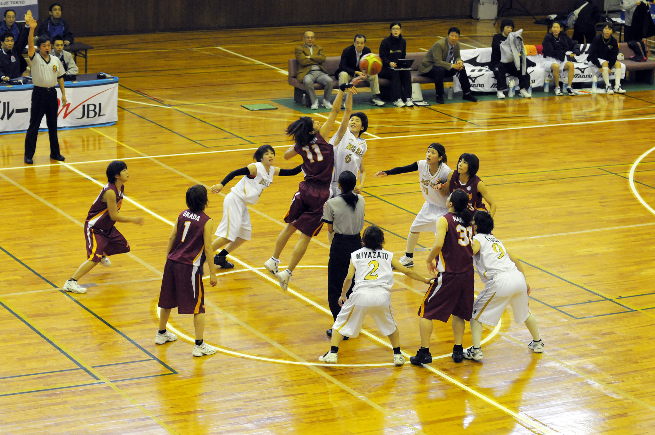 WJBL 11-12レギュラーリーグ WI、トヨタ紡織対ビッグブルー東京。東京海上石神井体育館で。